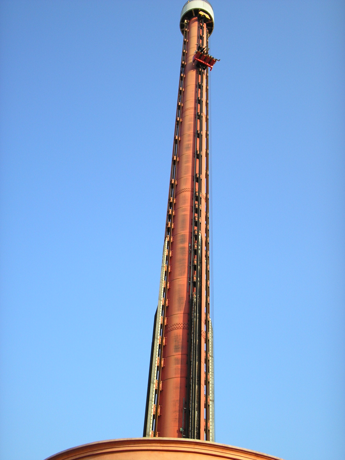 Brinquedo Cabhum, Terra Encantada, Rio de Janeiro, Barra da Tijuca